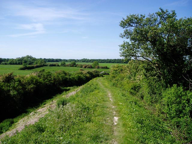 Fleam Dyke